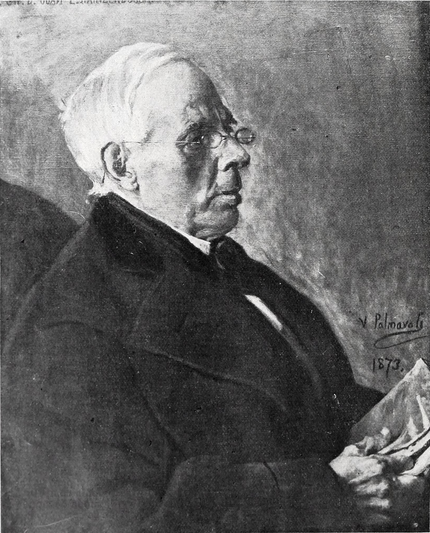 Fotografía para la revista Blanco y Negro de un retrato de Juan Eugenio Hartzenbusch obra de Vicente Palmaroli, pintado para la colección del Ateneo de Madrid.